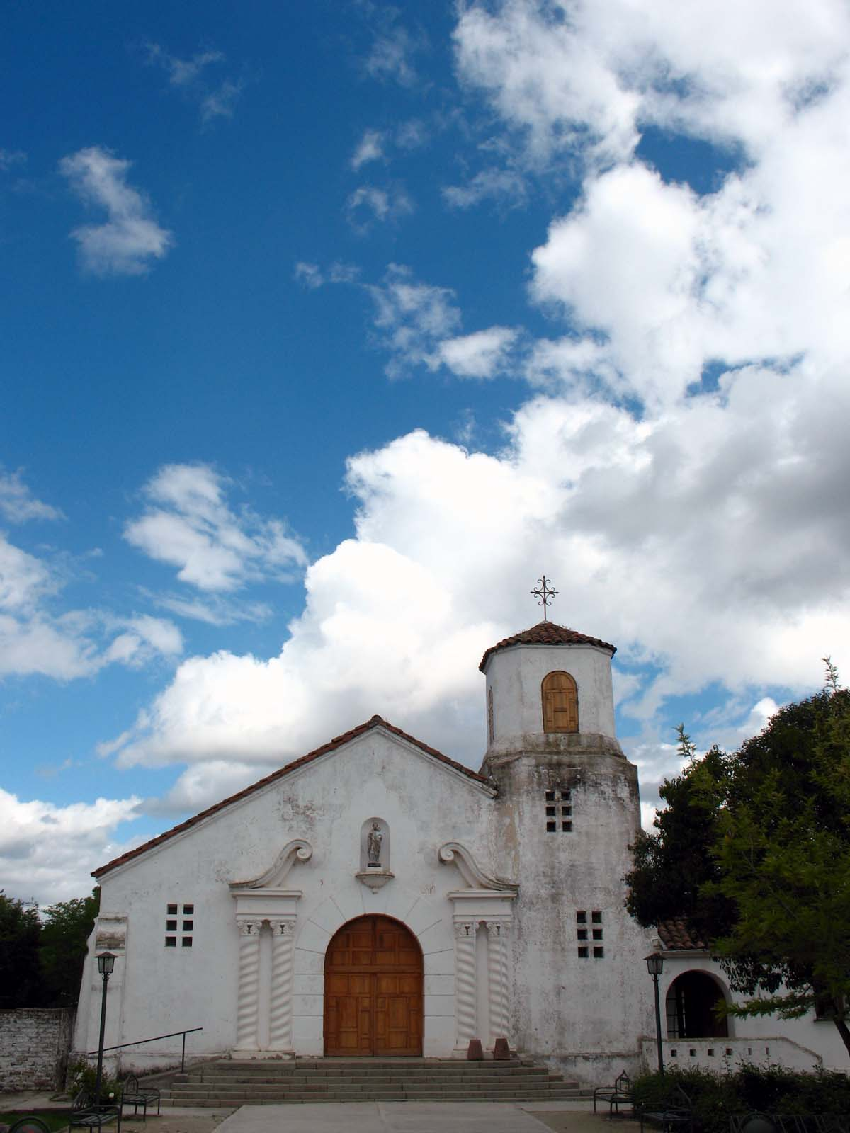 iglesia cunaco